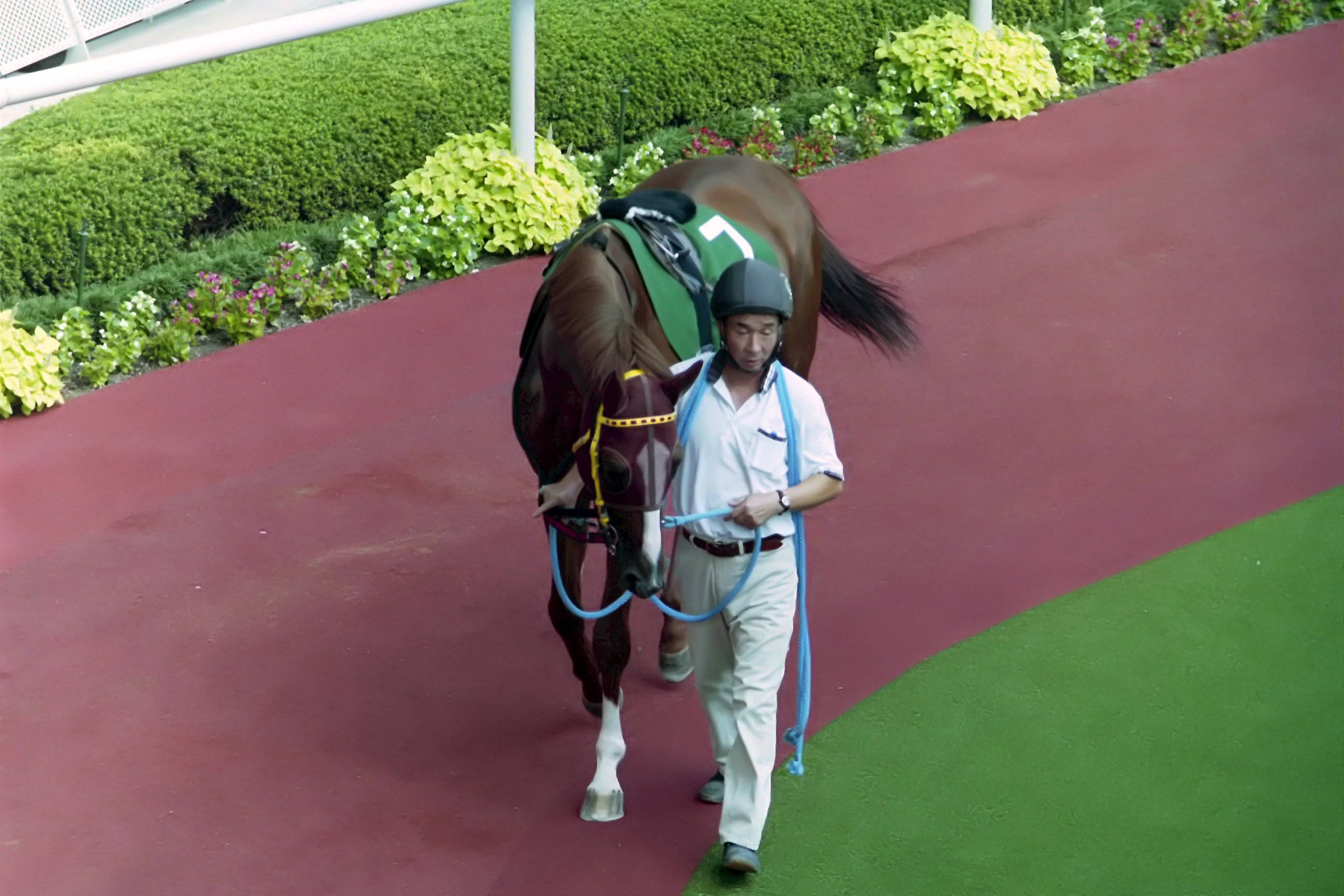 ヴィータローザ号